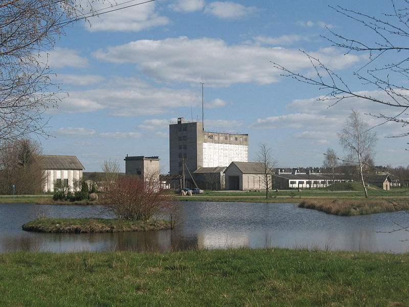 Grabupių tvenkinys